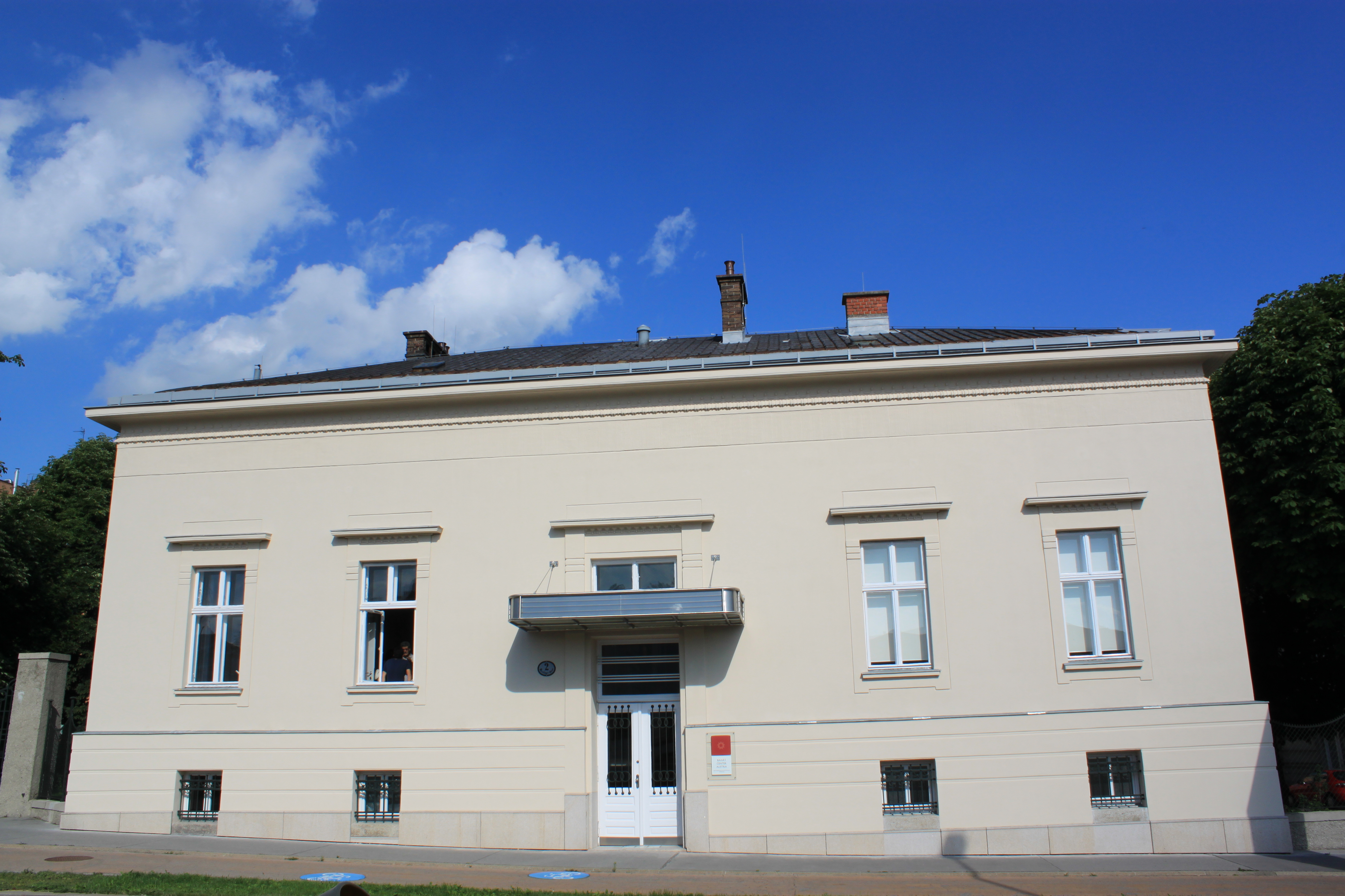 Ehem. Offizierskasino Maroltingergasse 2, 1140 Wien.jpg